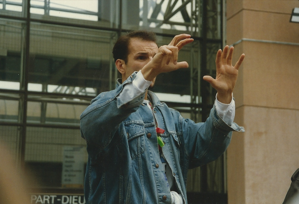 Bruno Moncelle contre l'implant cochléaire à Lyon